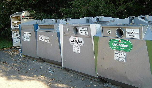 Glas und Papiercontainer in Niederhofheim am Friedhof Schmiehbachtal.